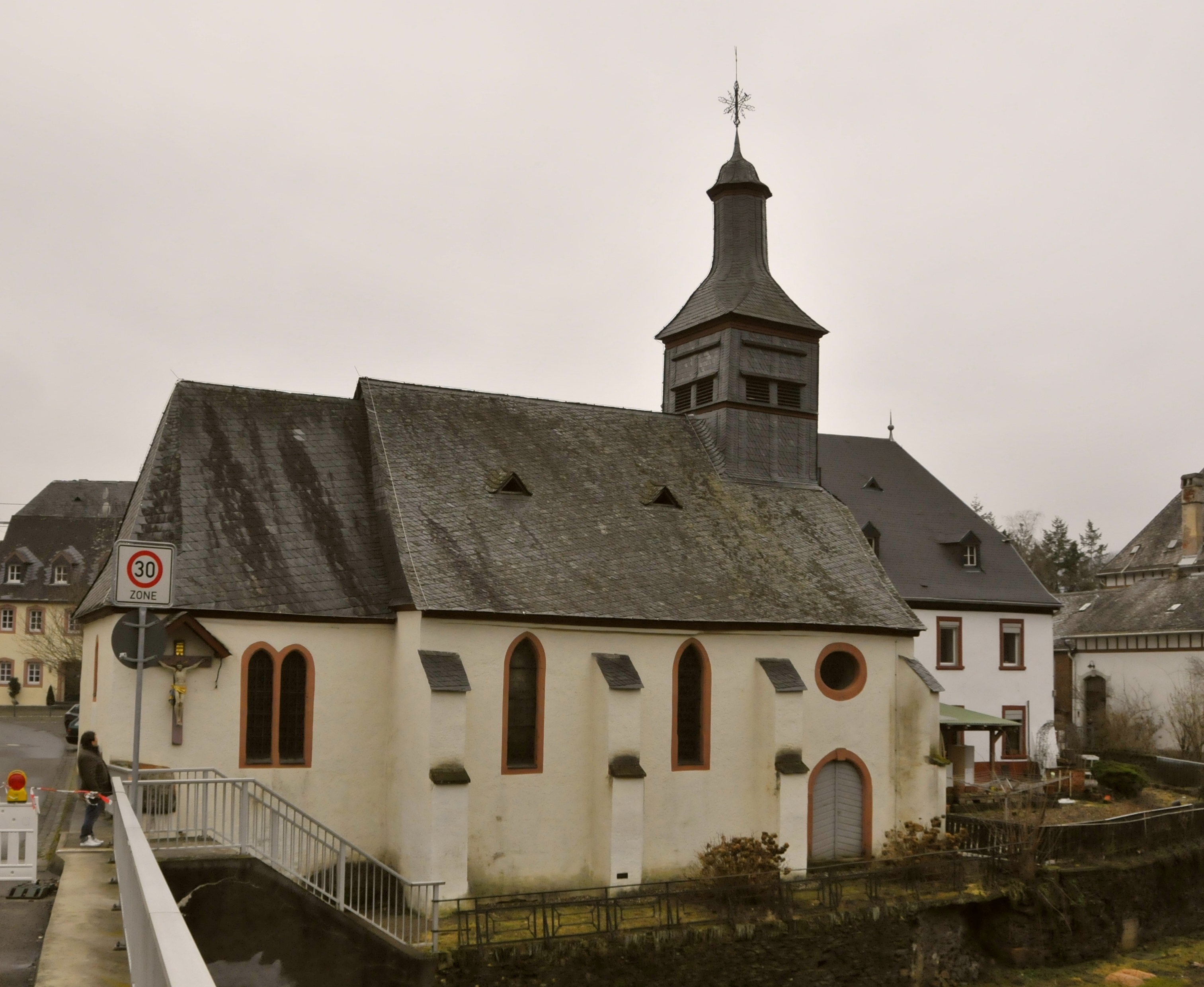 Piesport, Allerheiligenkapelle